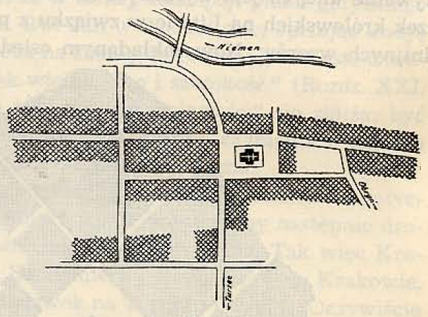 Беларуская (тарашкевіца): Ярэмічы (Jaremičy)